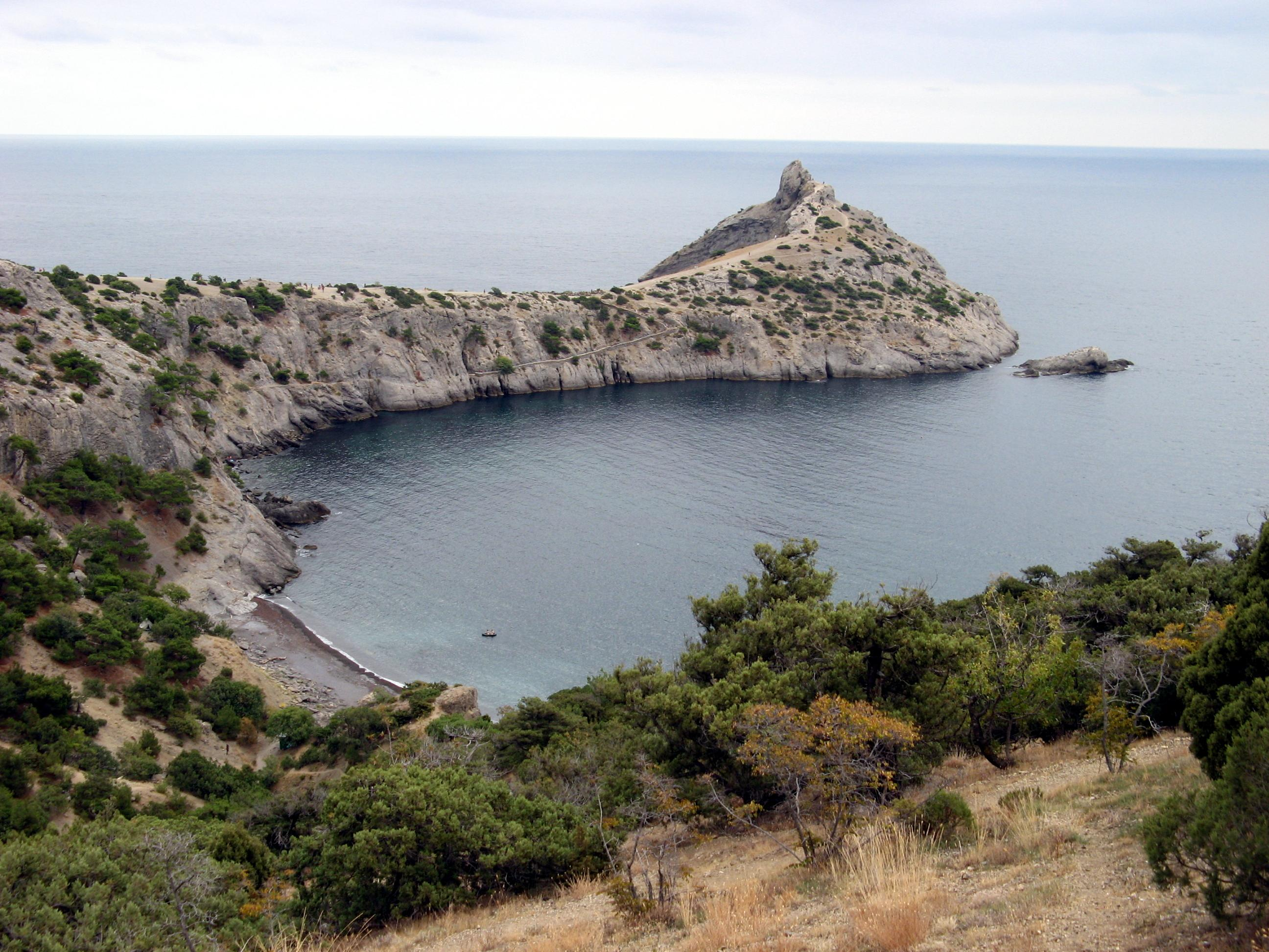 Новый Свет. Вид на мыс Капчик и Царский пляж.